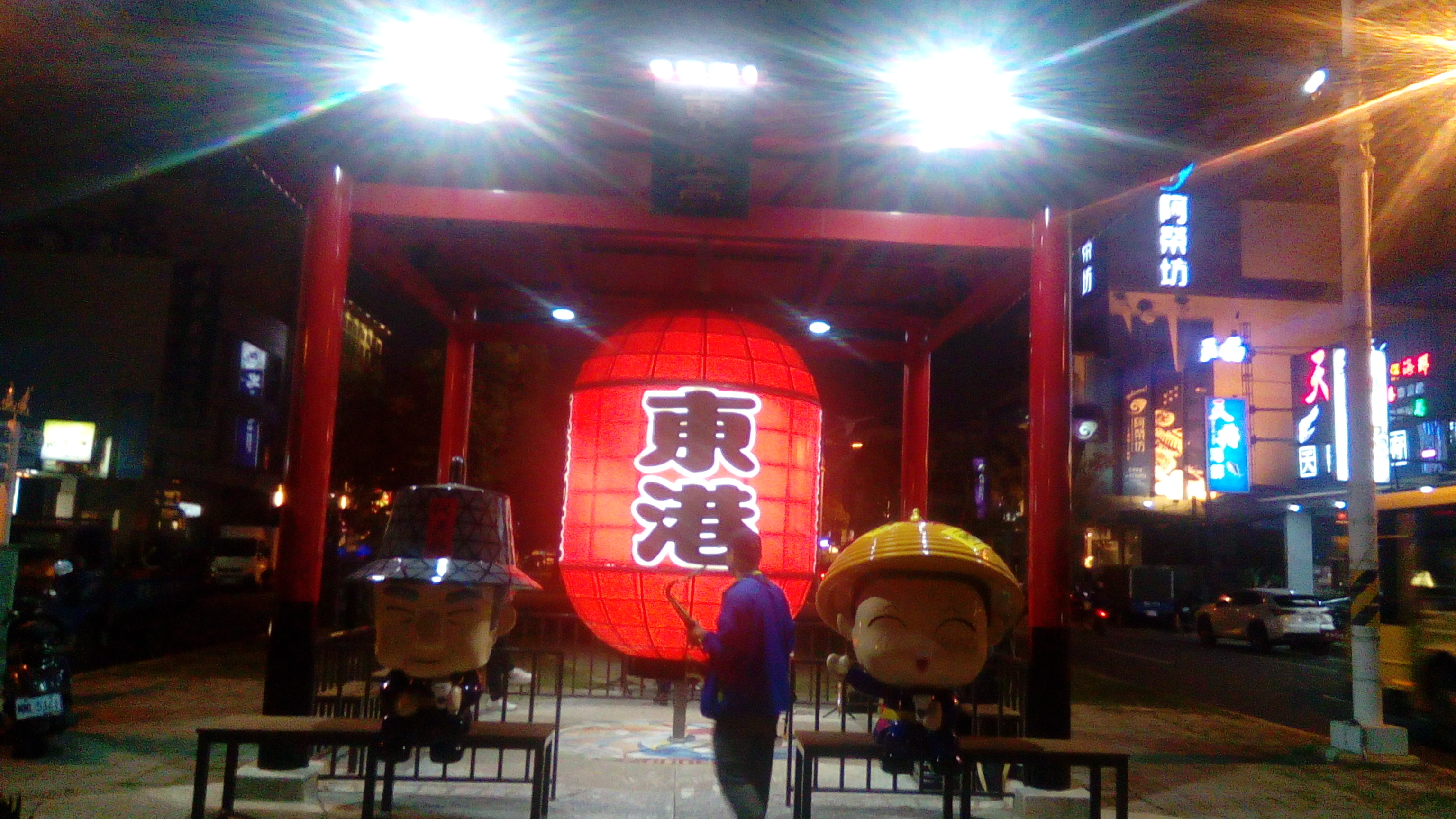 位於光復路 因王船祭而設置